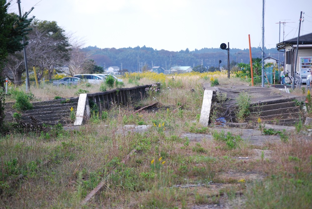 東北地方太平洋沖地震後の旧鉾田駅プラットホーム。液状化現象によりホームが破損した。鉾田市。